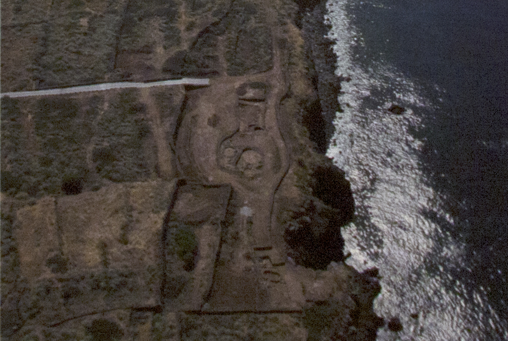 Veduta dall'alto di Filo Braccio